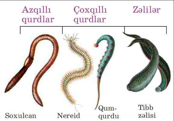 Çoxqıllı qurdlar